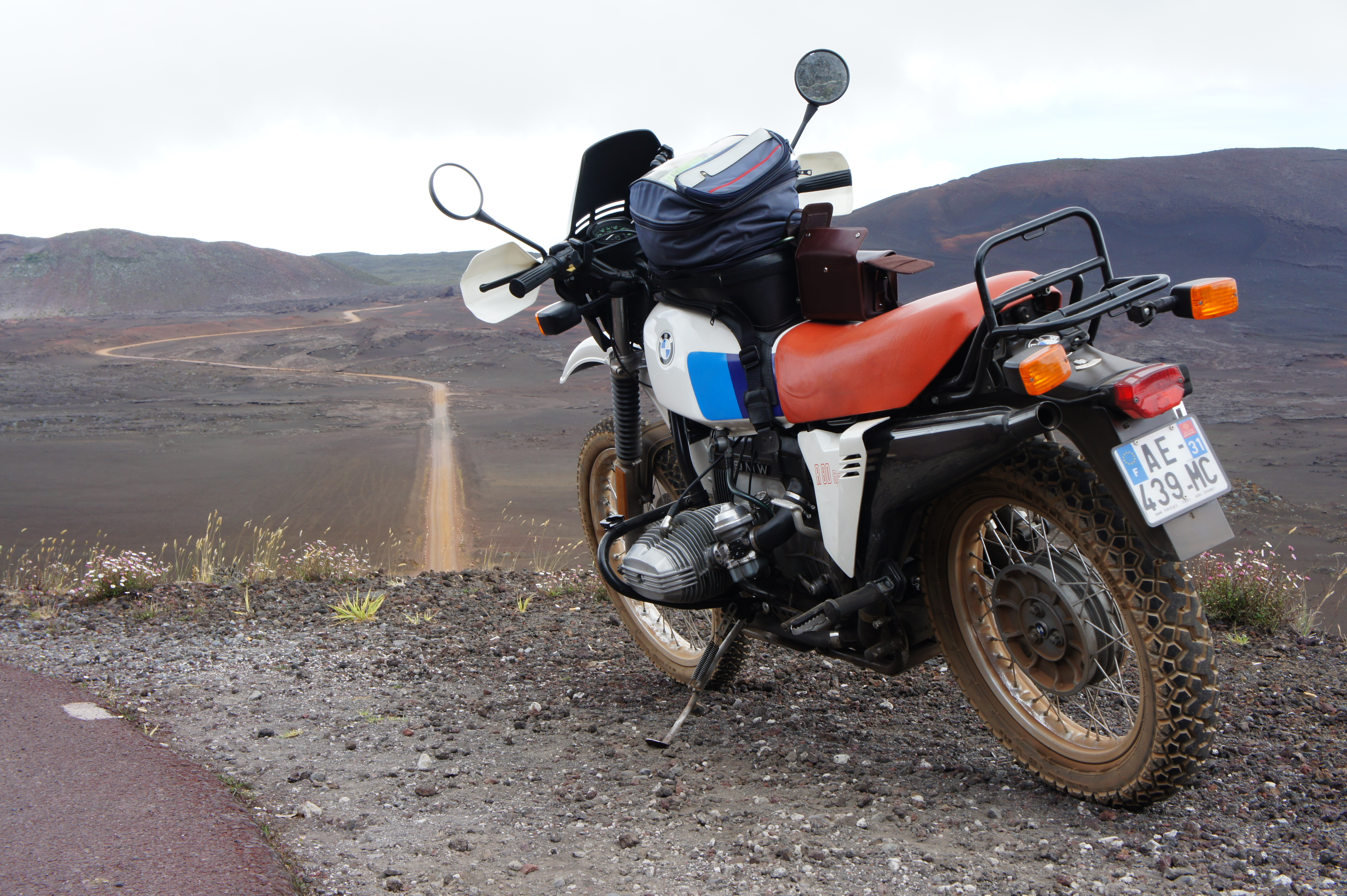 BMW R80 G/S de 1981. Photo prise dans la plaine des sables, ile de la Réunion, France